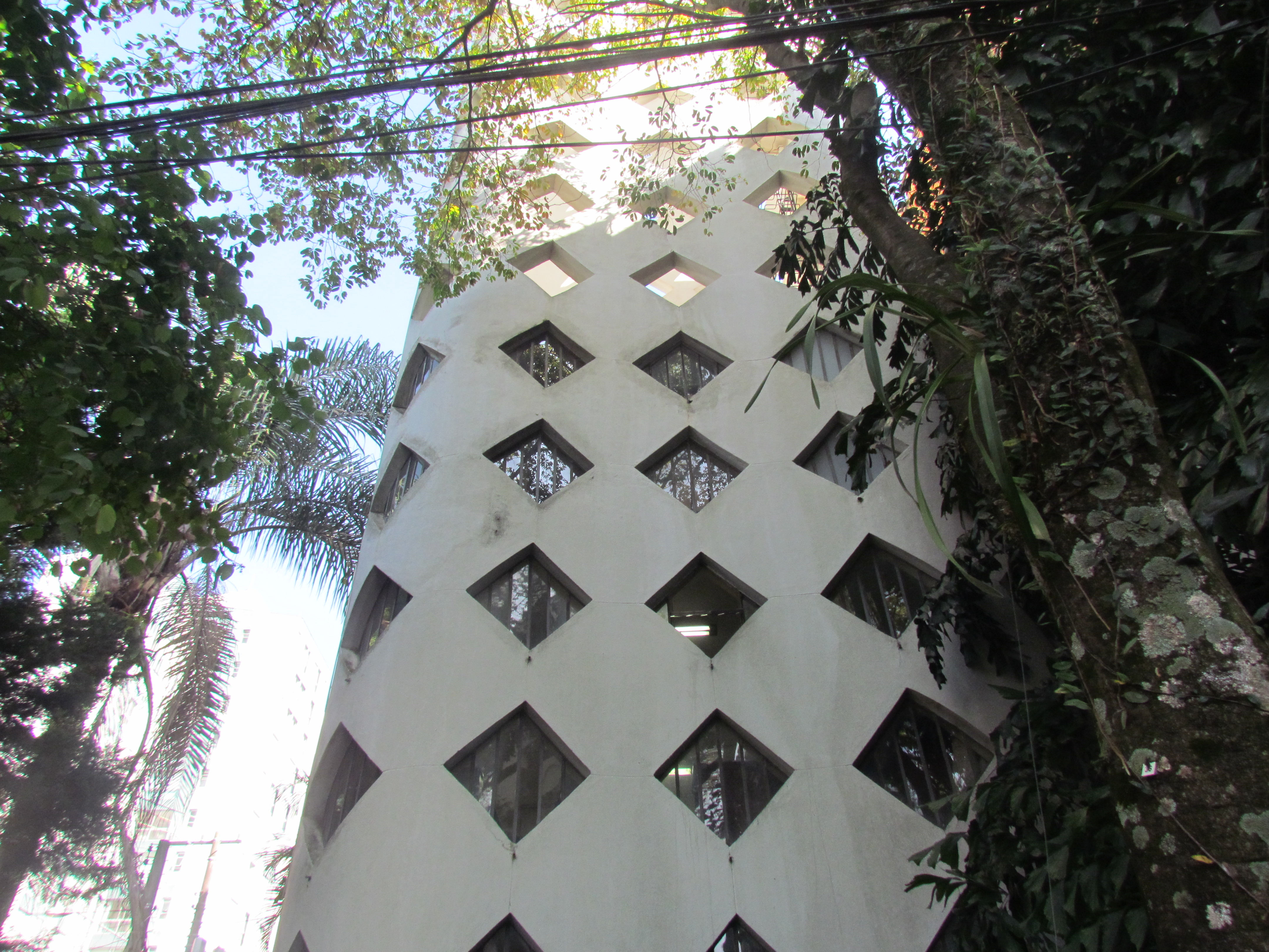 Parte lateral da torre da Igreja de São Domingos, em São Paulo (SP), Brasil.